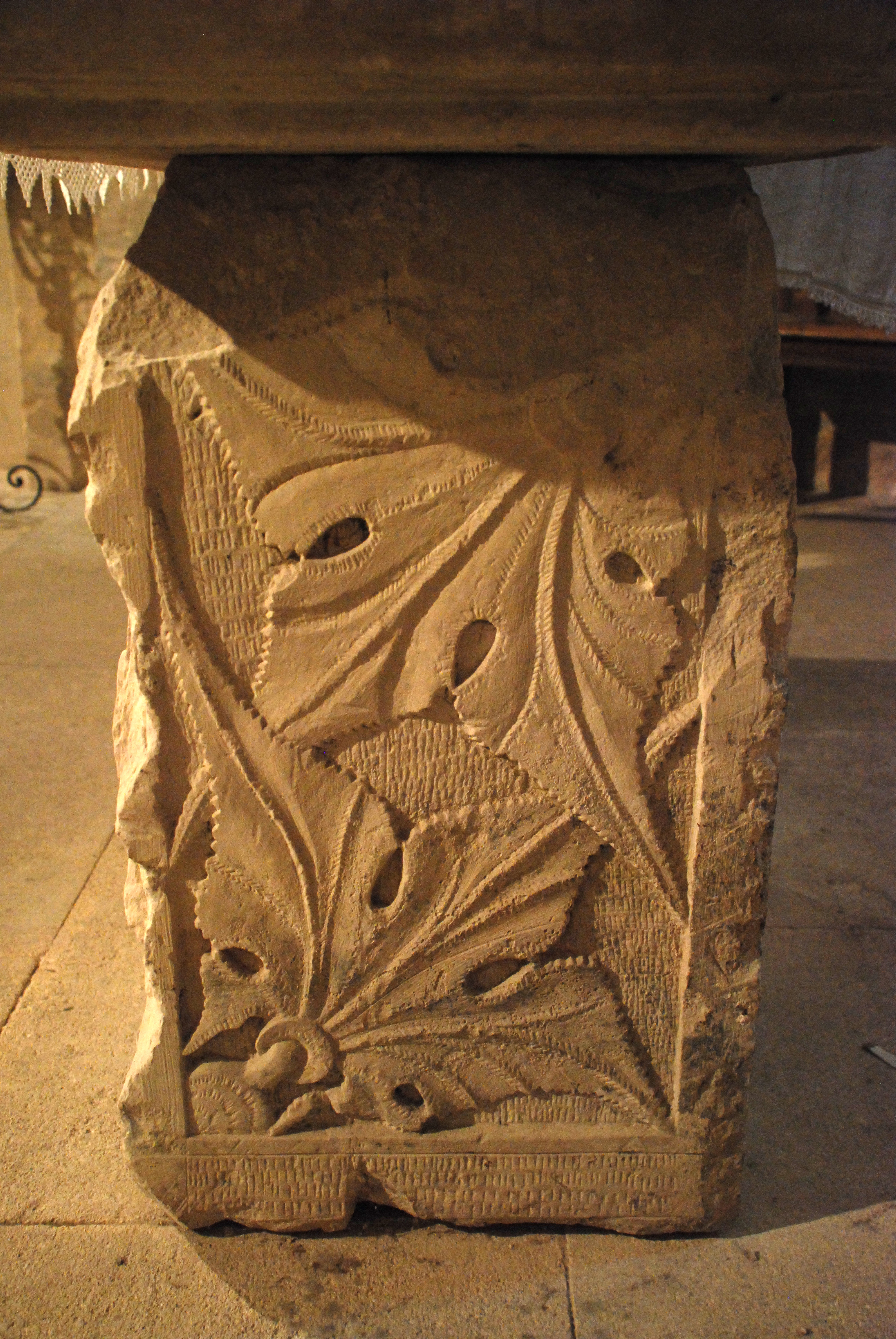 France - Provence - Vaucluse - Église Notre Dame-et-Saint-Christophe de Saint-Christol